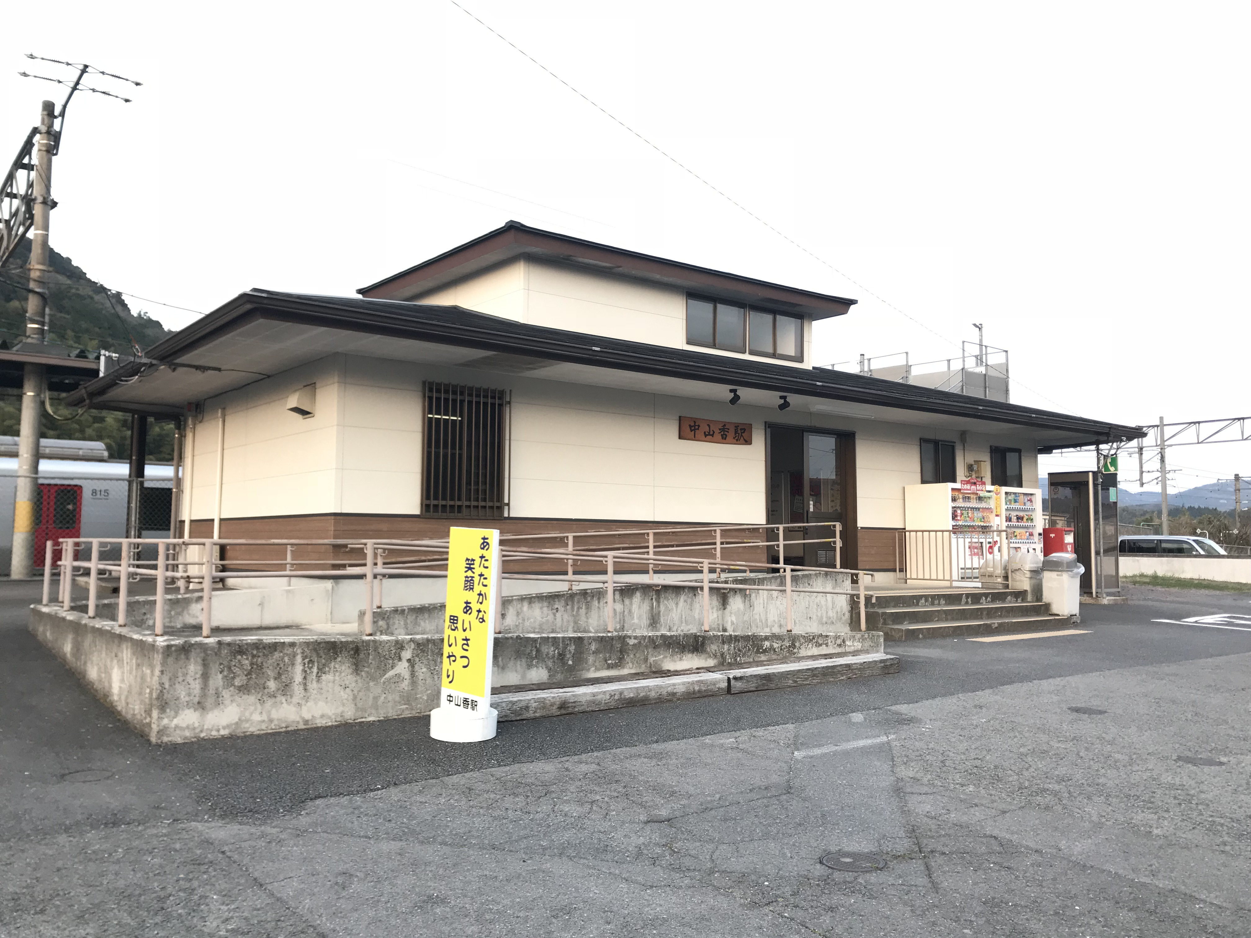 中山香駅の駅舎